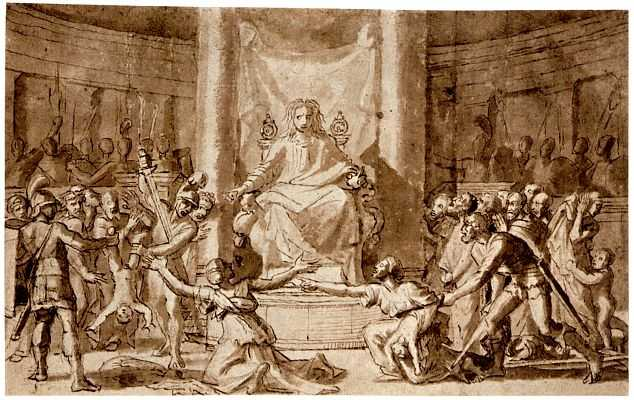 Studie zu: Das Urteil des Salomon, Feder & Kreide auf Papier, 24,8 x 38,4 cm